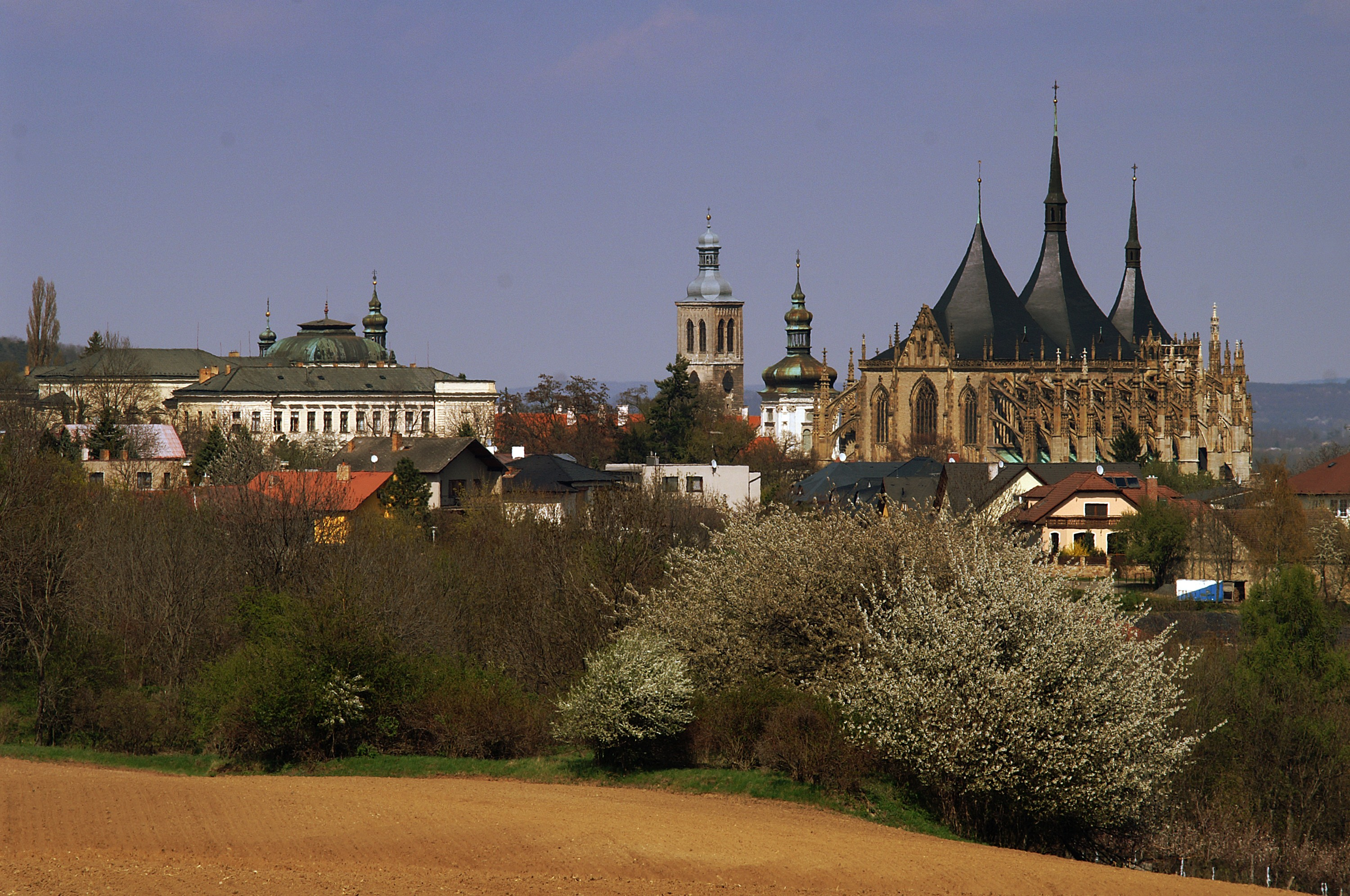 Kutna Hora